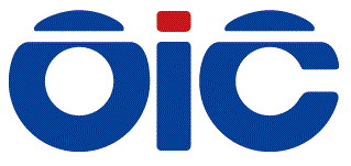 大阪情報コンピュータ専門学校のロゴ・校章